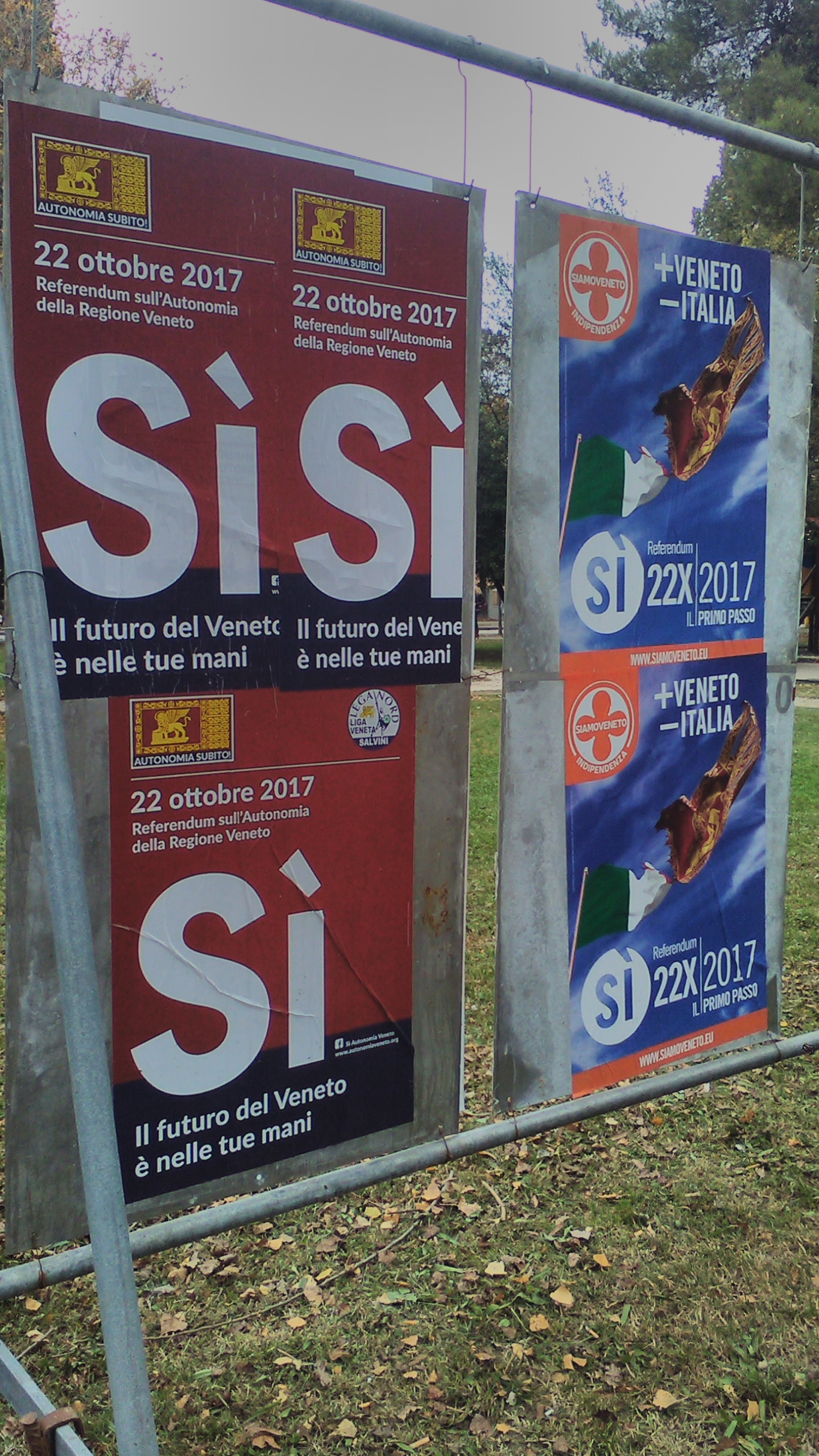 Propaganda per Referendum Veneto 2017